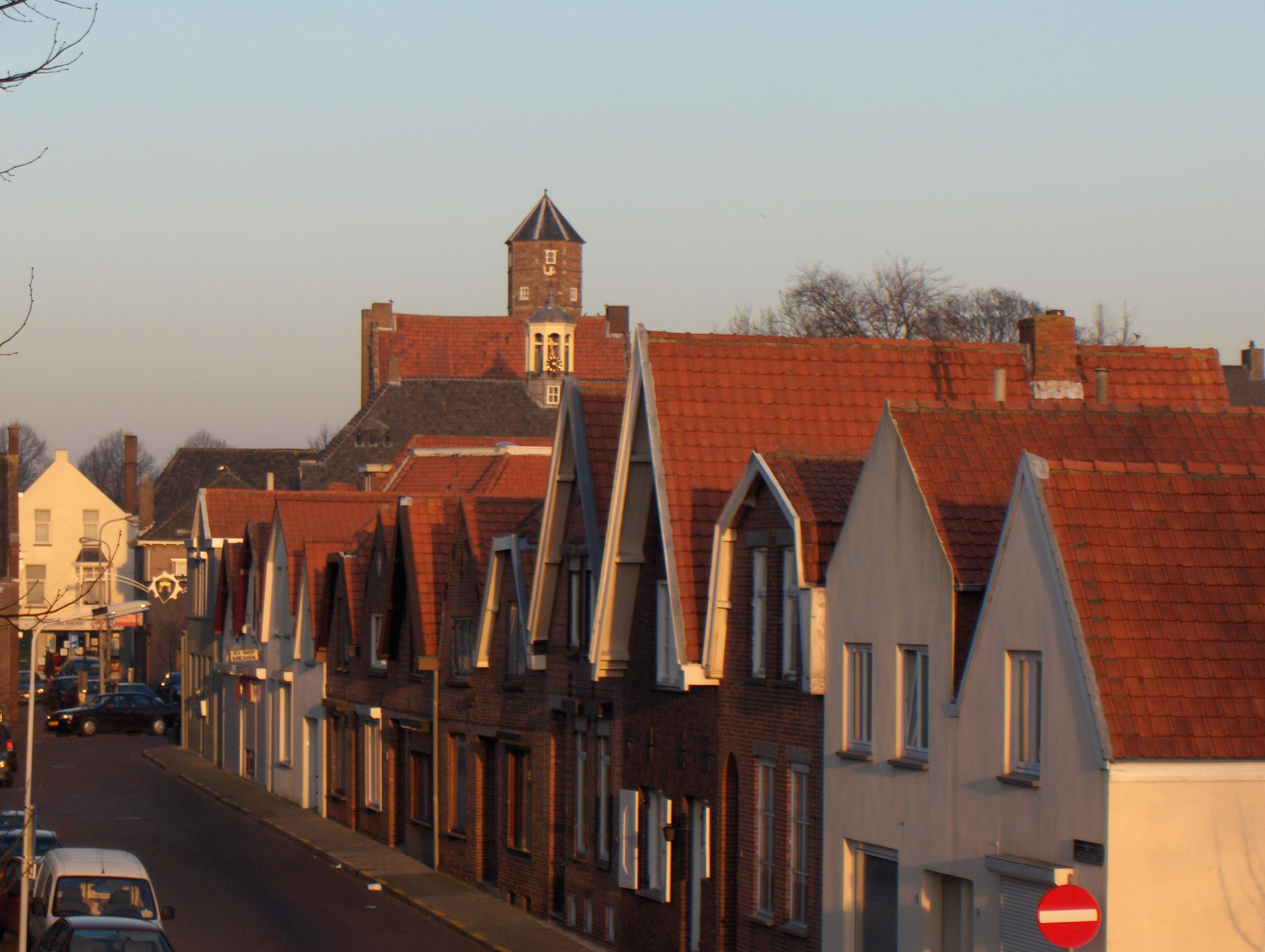 Beschreibung: Hulst (Niederlande, Prov. Zeeland), Vestdijkstraat mit Häusern aus der 1. Hälfte des 20. Jh.s, Blick von Westen. Im Hintergrund Turm des Refugiums der Abtei "Ter Duinen". Datum: 15. Januar 2006 Fotograf: Friedrich Tellberg